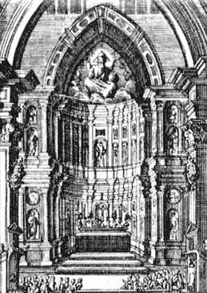 La scomparsa tribuna della Cattedrale di Palermo progettata da Antonello Gagini in una stampa del XVIII secolo